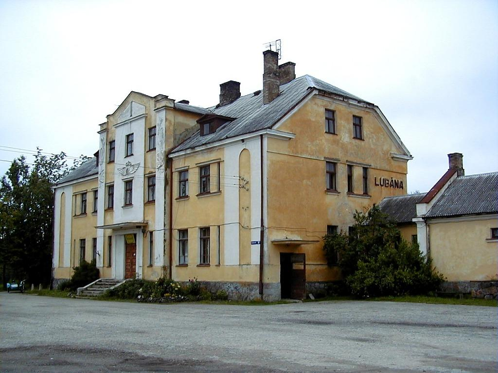 Ancienne gare ferroviaire de Lubāna (Lettonie)